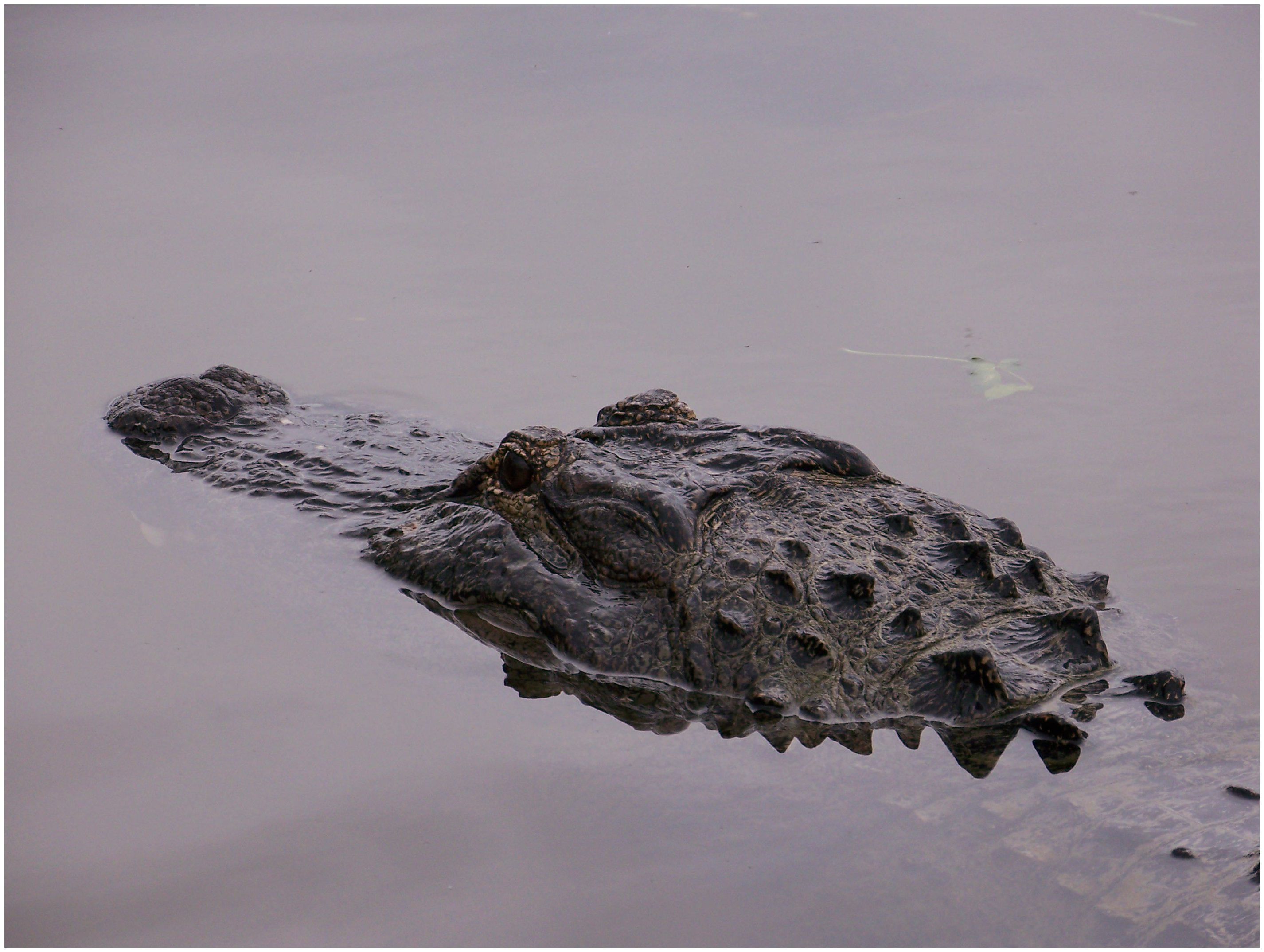 Alligator, Everglades, FL, USA